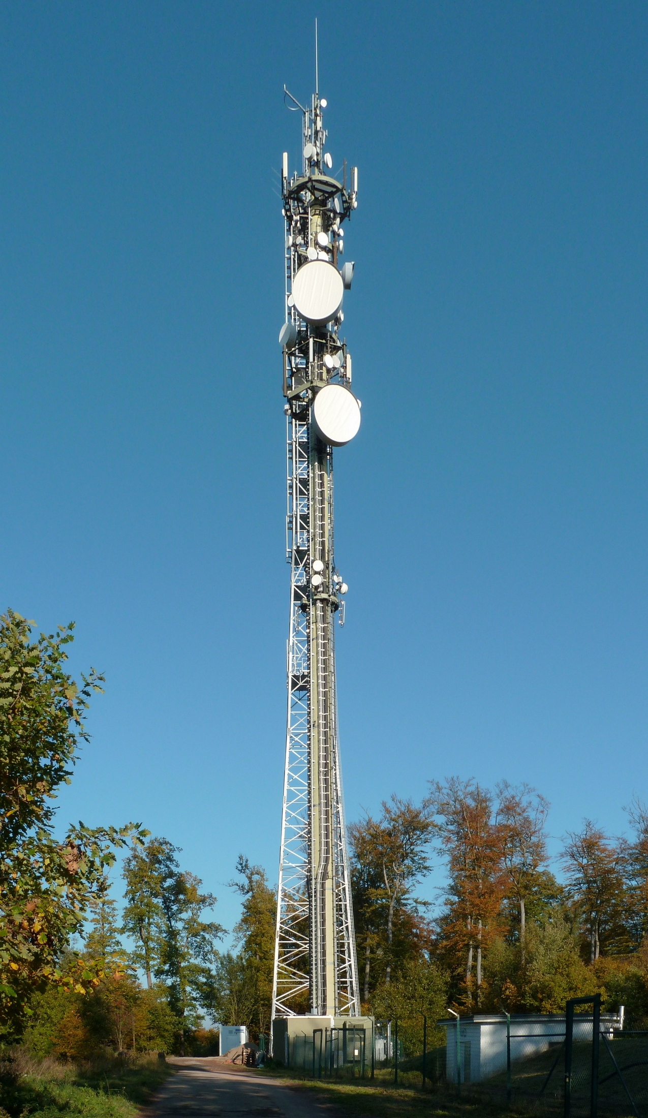 Sendemast auf dem Höcherberg bei Bexbach (Saarland).